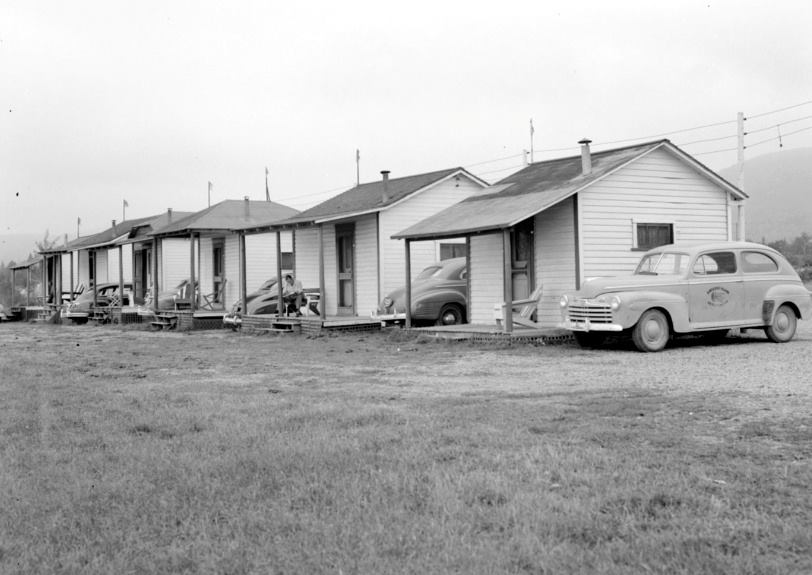 Hôtel et cabines de L.V. Cavanagh à Pointe-à-la-Garde